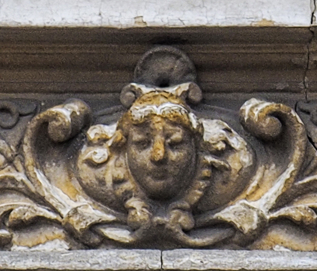 Detaliu exterior (casa părintească a scriitorului român de origini albaneze Victor Eftimiu)